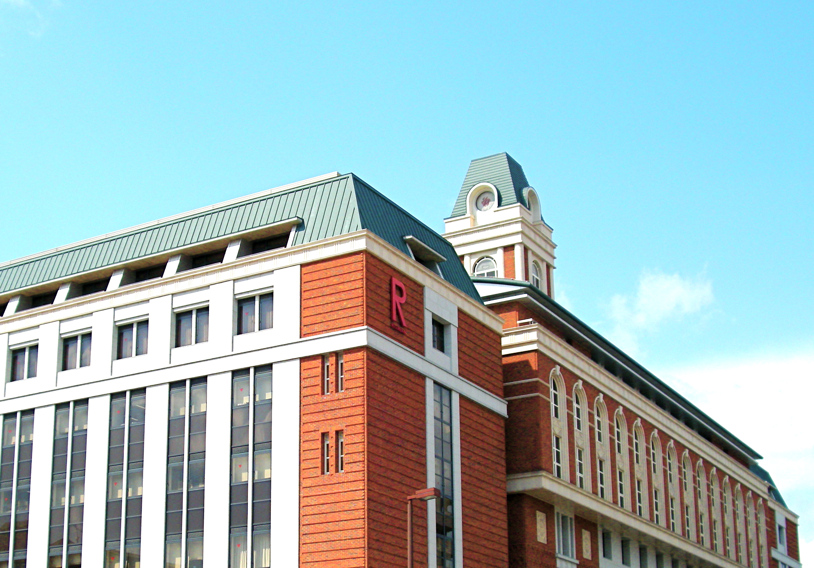 Nakagawa Hall (Suzaku Campus, Ritsumeikan University, Kyoto, Japan)